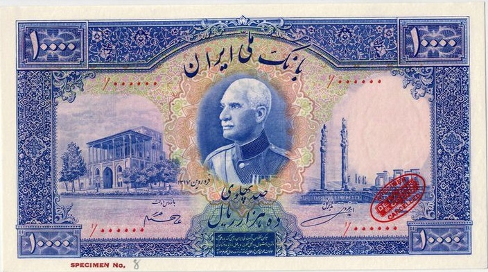 اسکناس نمونه ده هزار ریالی (صد پهلوی) رضا شاه که هرگز به مرحله چاپ در تیراژ بالا و توزیع نرسید.